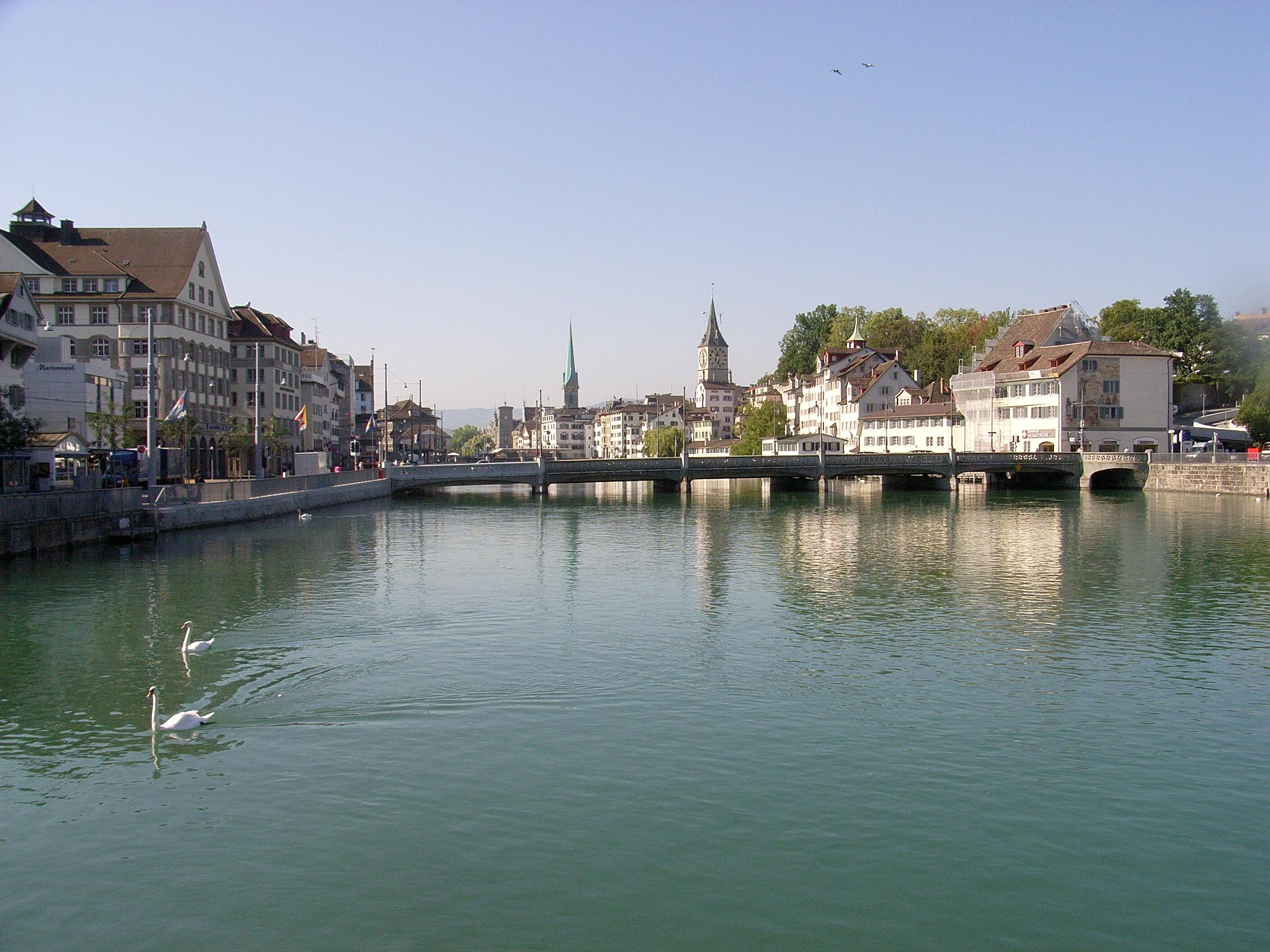 Dieses Bild zeigt den Fluss Limmat in Zürich.